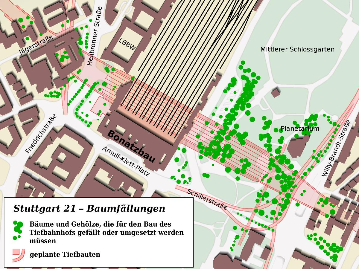 Grafische Übersicht über die für den Bau des Tiefbahnhof zu fällenden Bäume und Gehölze, basierend auf in PFA 1.1 und 1.2 und Anhängen gemachten Angaben (speziell PFA 1.1 Anlage 18.2.1a), abgeglichen mit weiteren Plänen der Stadt Stuttgart und Bildern von Google. Die Grafik zeigt den Planungsstand von 2002 bzw. 2005. Einige Details im Bereich der Grundwasserfilteranlage entsprechen bereits dem Ist-Zustand vom Oktober 2010, der von den Planungen von 2002 abweicht.